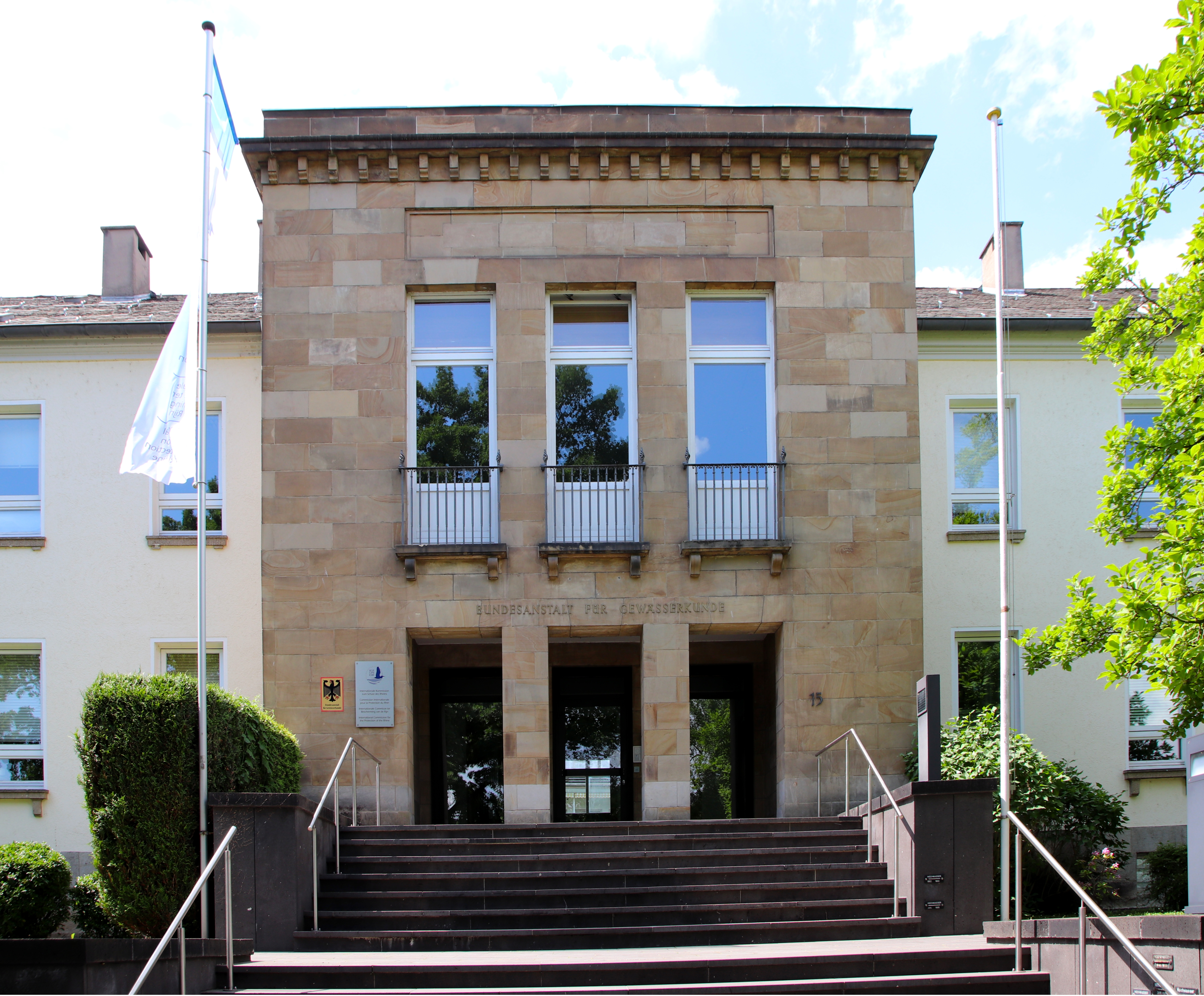 Gebäude der Bundesanstalt für Gewässerkunde in Koblenz